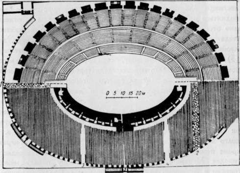 Պոմպեյի ամֆիթատրոնը